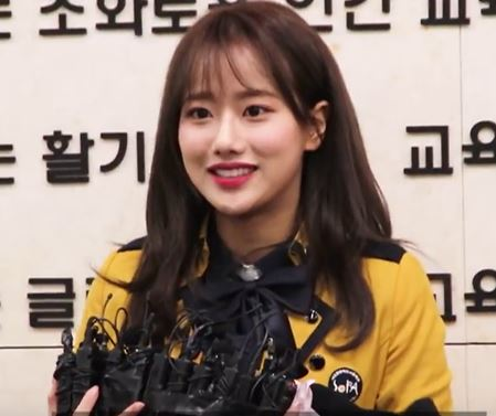 180208 나은 (에이프릴) 이 서울공연예술고등학교 졸업식에 참석했습니다.